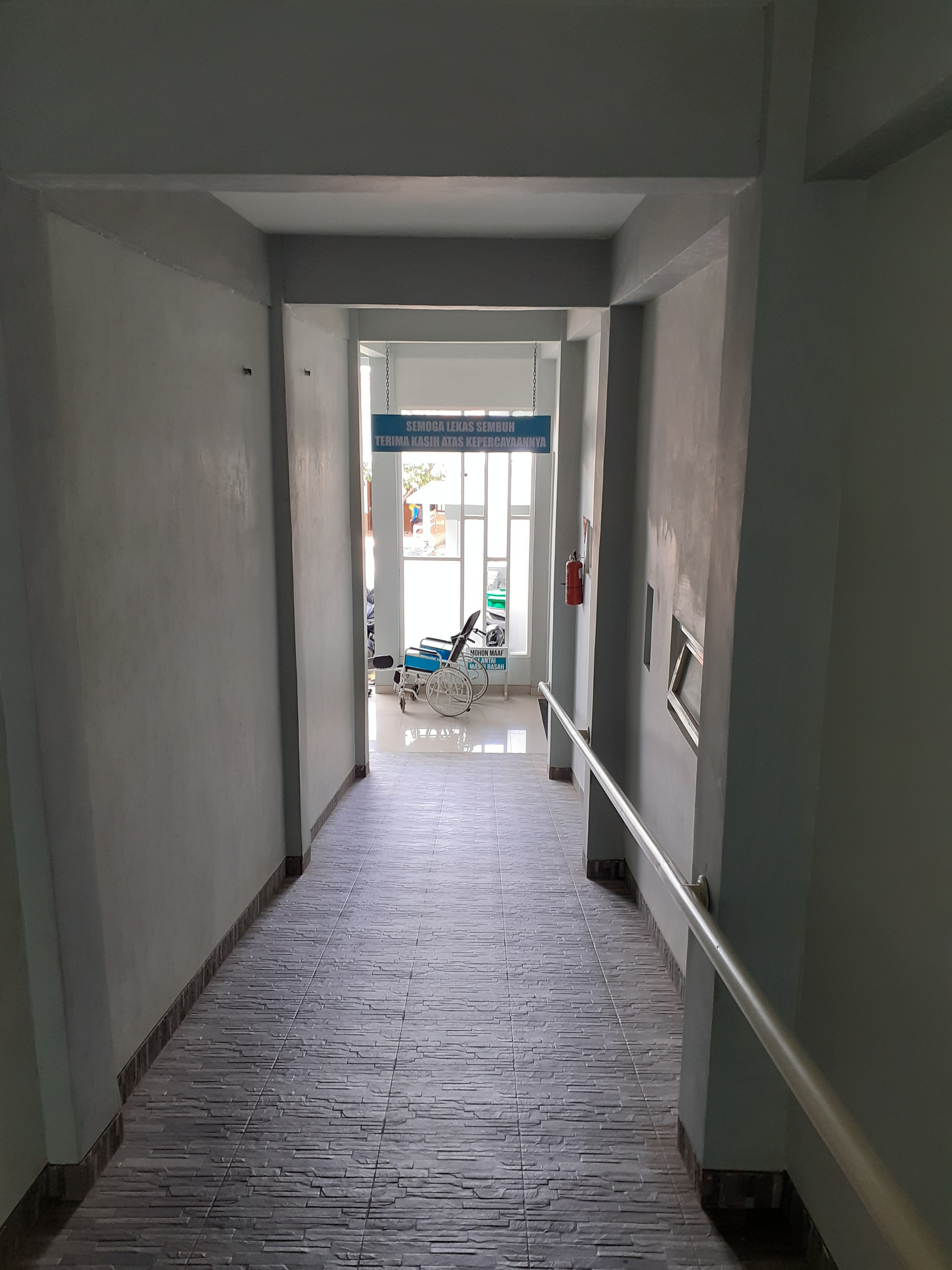 Bidang miring pada sebuah klinik di Banyuwangi. Berfungsi untuk mempermudah mobilitas pasien yang menggunakan kursi roda maupun ranjang